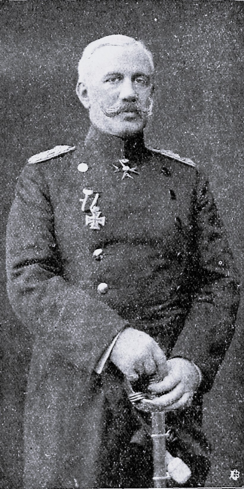 Oberst Nessler, bisher Oberst und Kommandant des Regiments „Lübeck“